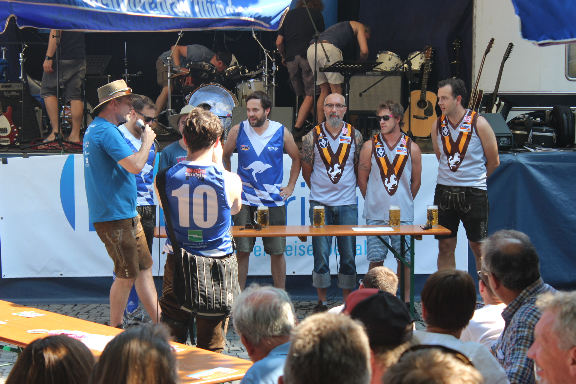 OzFest 2015 München, Rindermarkt – 2. Tag – Boat race (game)